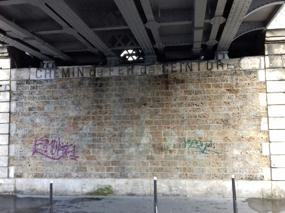 Gare de la ligne ferroviaire de Petite Ceinture sise 101 avenue de Vincennes (Paris - 20e). Détail de l'ancienne inscription, sous le pont du cours de Vincennes. Décembre 2017.